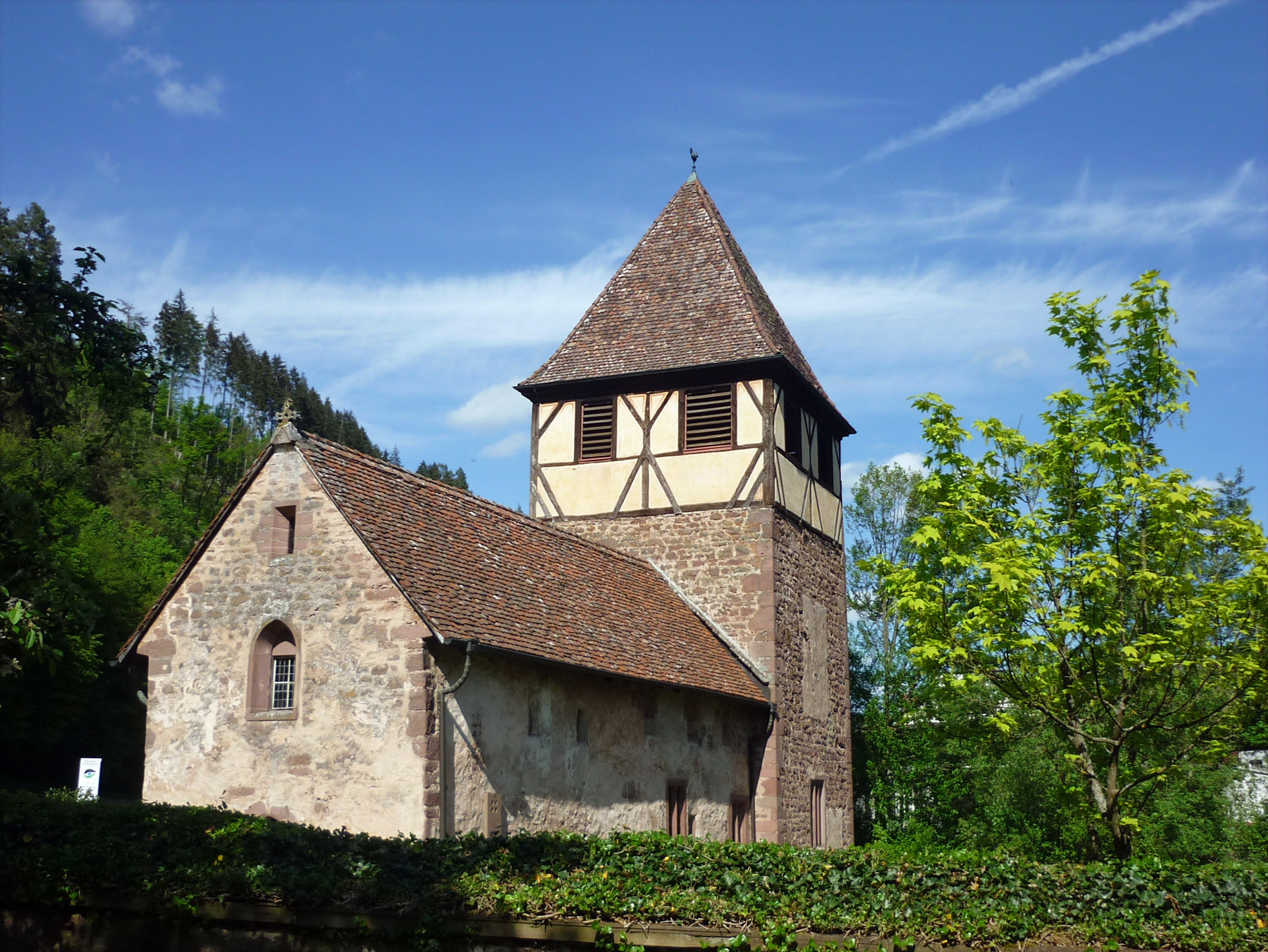 St. Candiduskirche in Kentheim, Lkr. Calw (Württemberg)